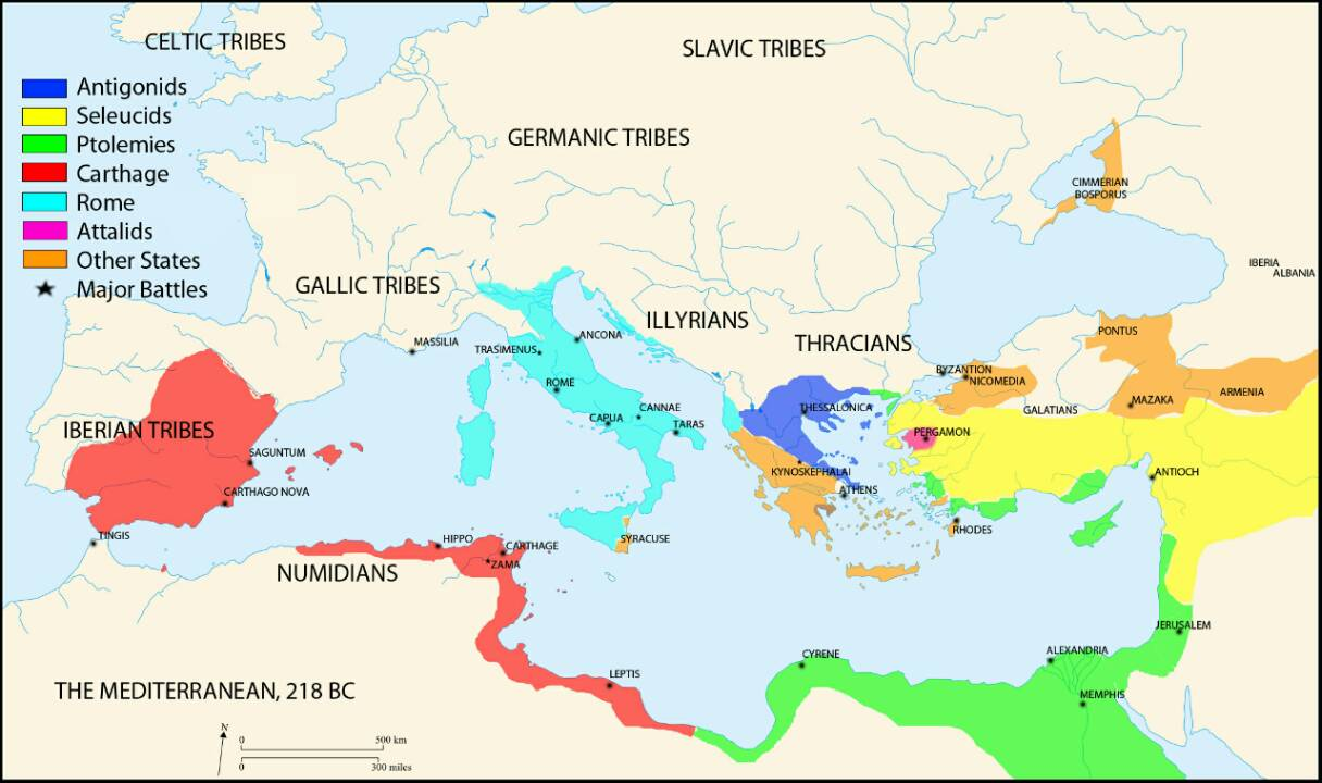 Mediterranean at 218 BC Blank map,nasa